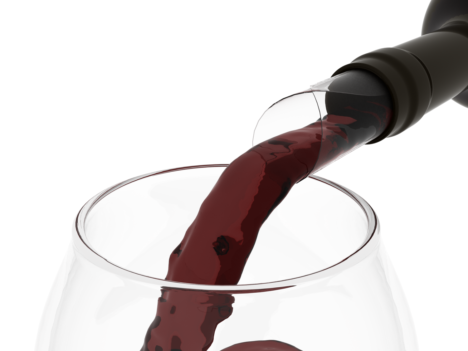 Nekapnica® - pomoć pri istakanju vina da spriječi kapanje